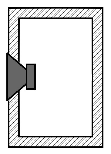 Croquis d'une enceinte close